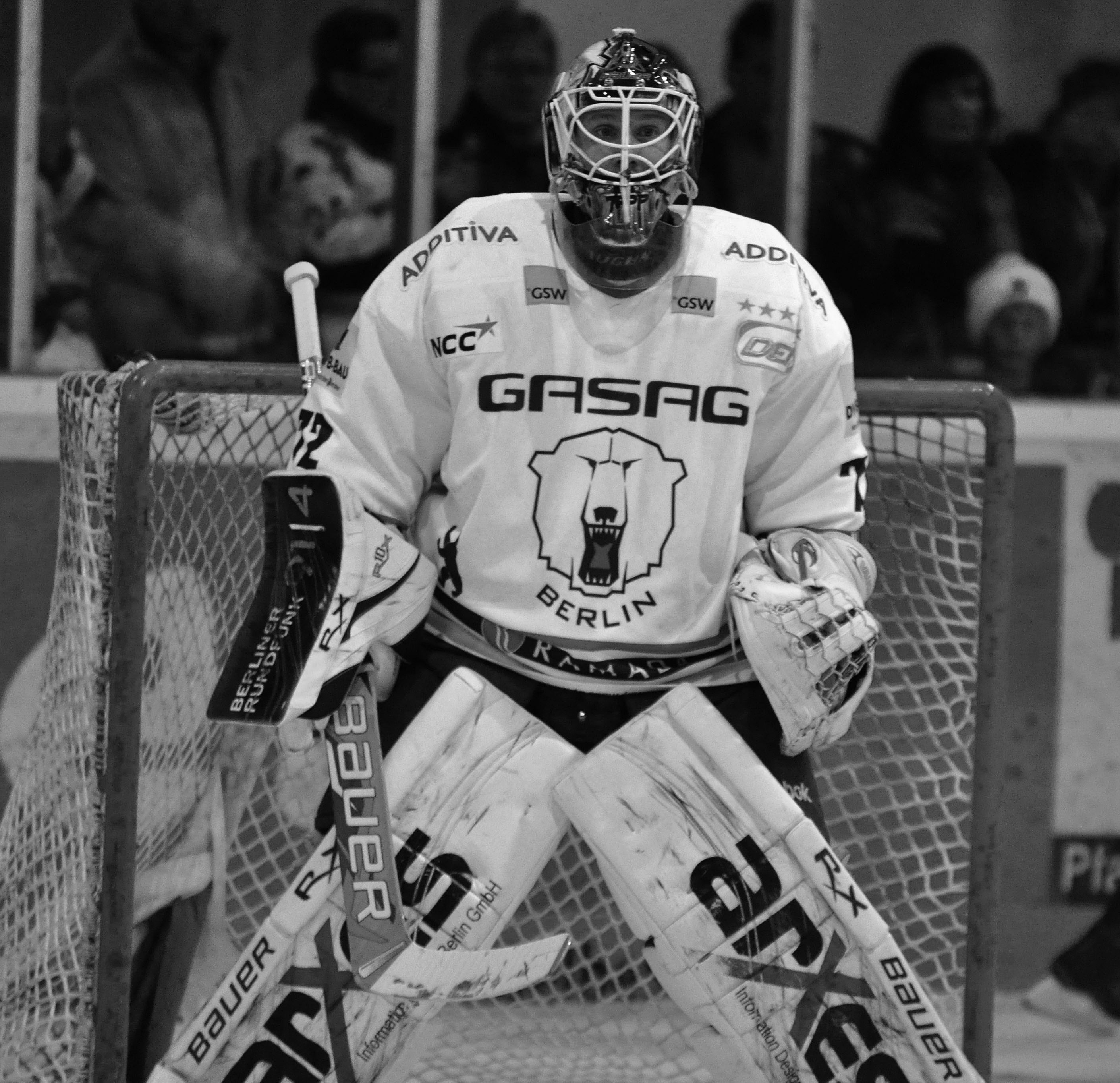 Rob Zepp, Straubing Tigers - Eisbären Berlin 07.04.2012m DEL PlayOff Halbfinale